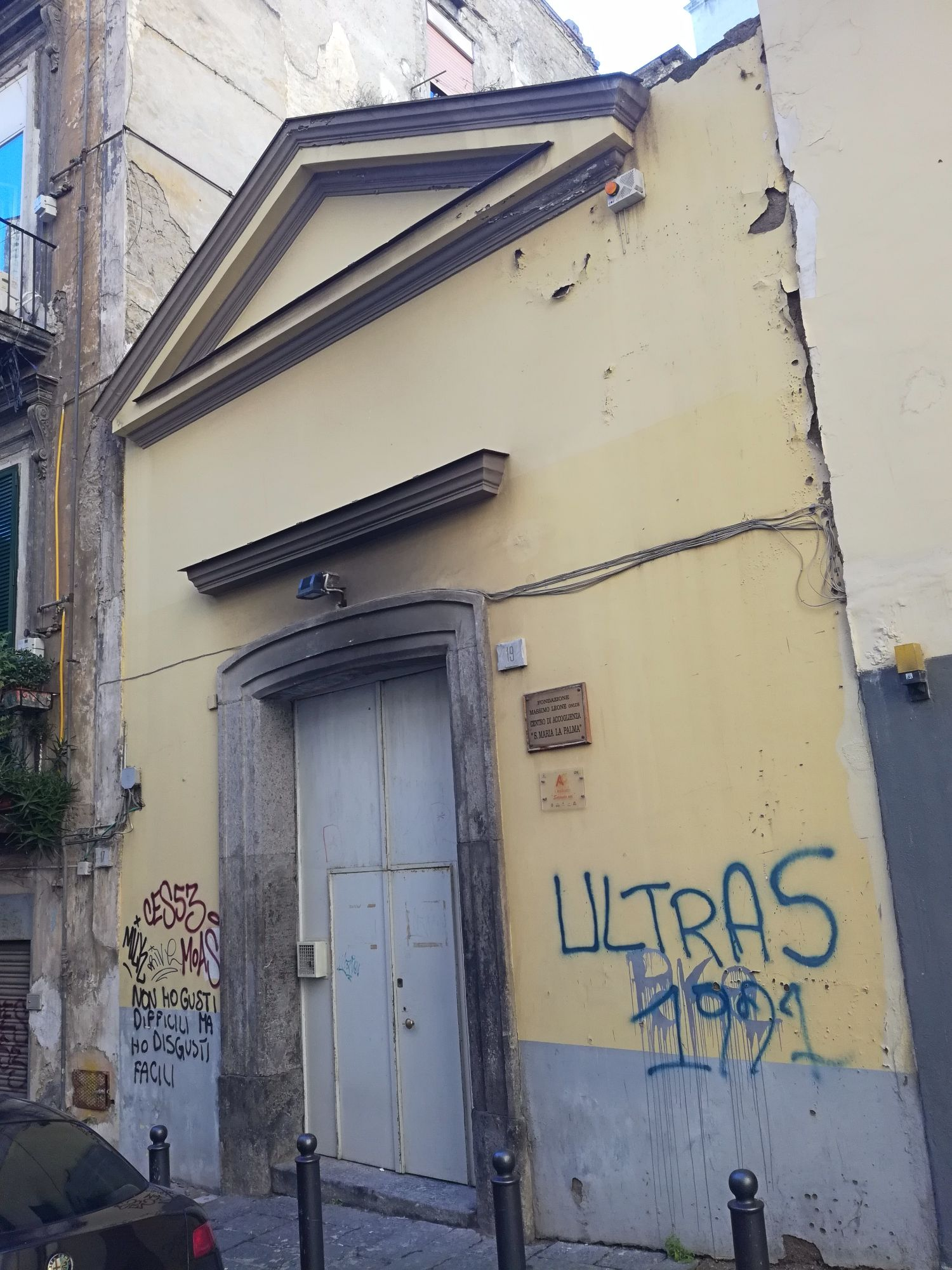 Chiesa di Santa Maria del Rifugio (Napoli)